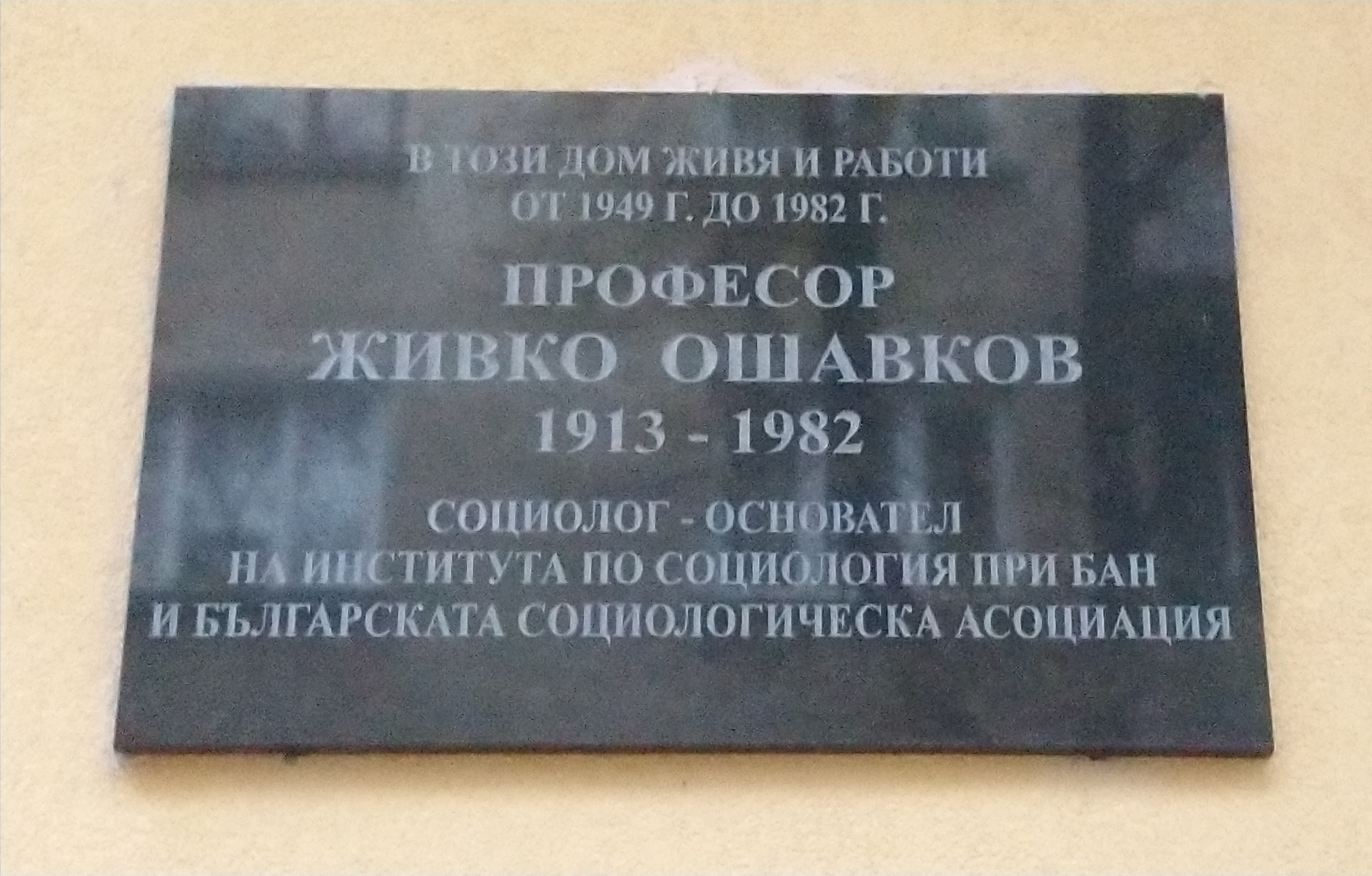 Паметна плоча на проф. Живко Ошавков на фасадата на дома му, ул. „Сан Стефано“ № 2, София